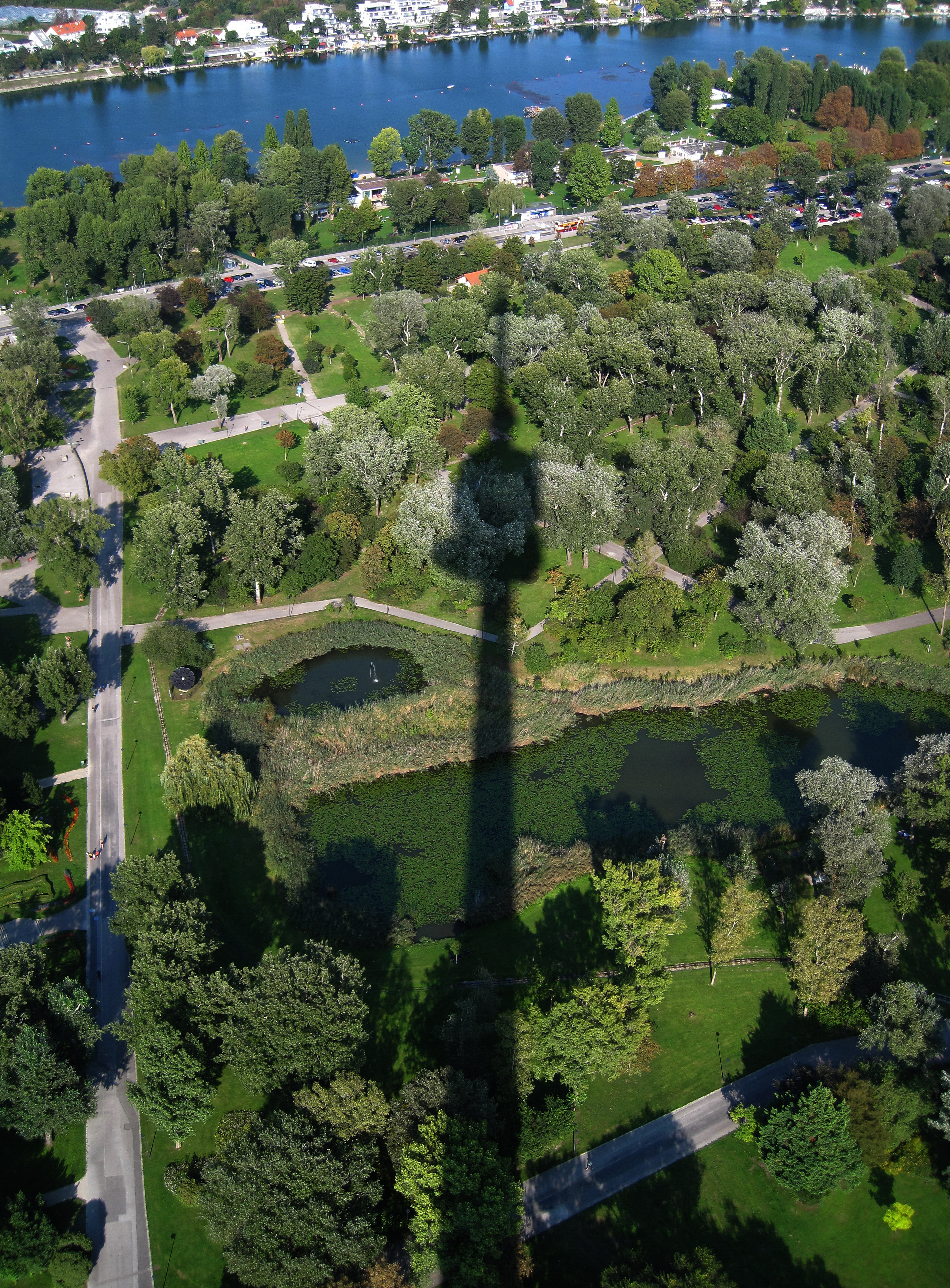 Donaupark, bauliche Gartenanlage; Teilstück südwestlich des Strandbades Alte Donau. Blick vom Wiener Donauturm (Aussichtsterrasse auf 150 Meter). Schatten des 252 Meter hohen Donauturmes über die bauliche Gartenanlage Donaupark zur Arbeiterstrandbadstraße in Wien.